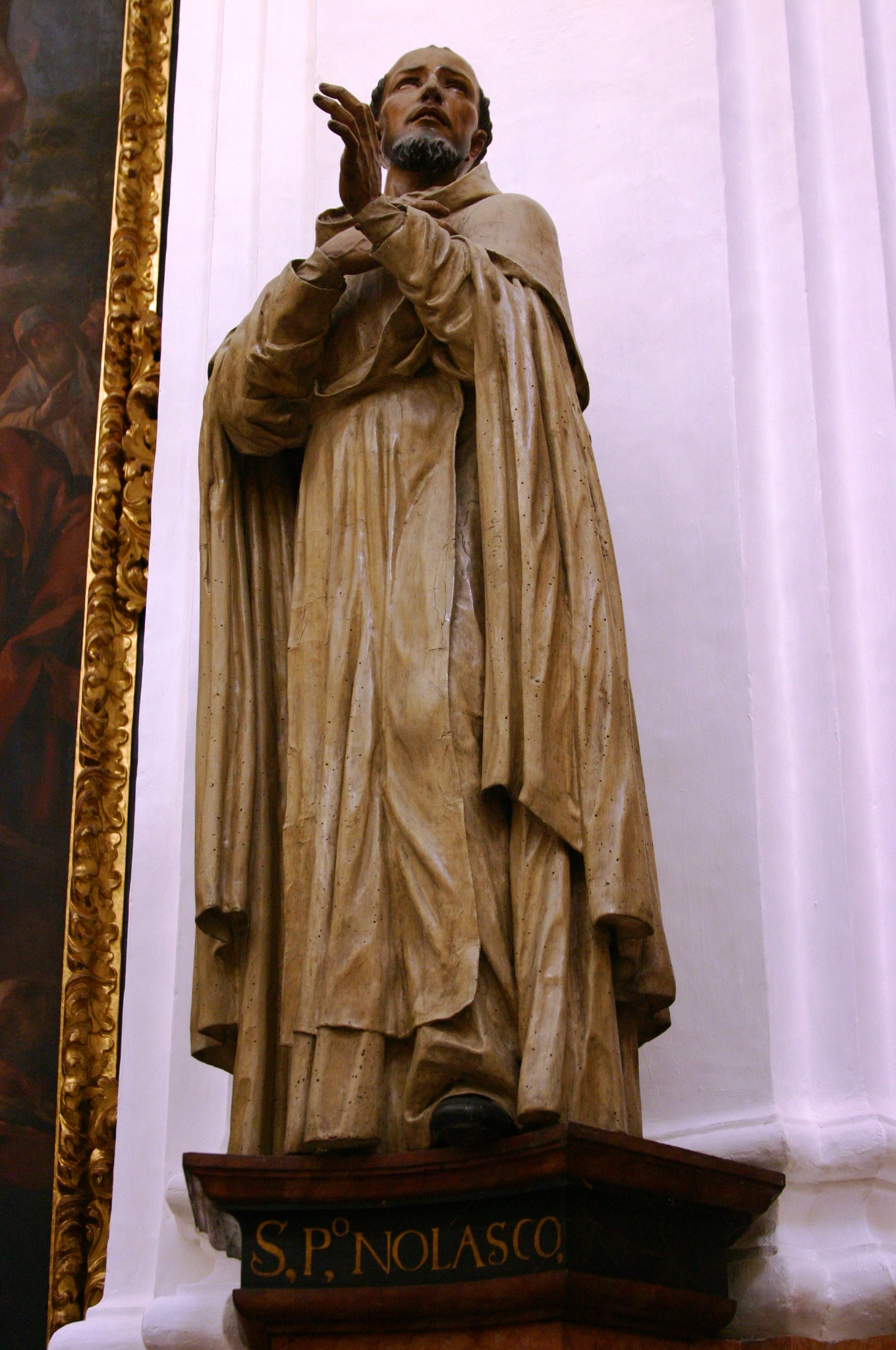 São Pedro Nolasco